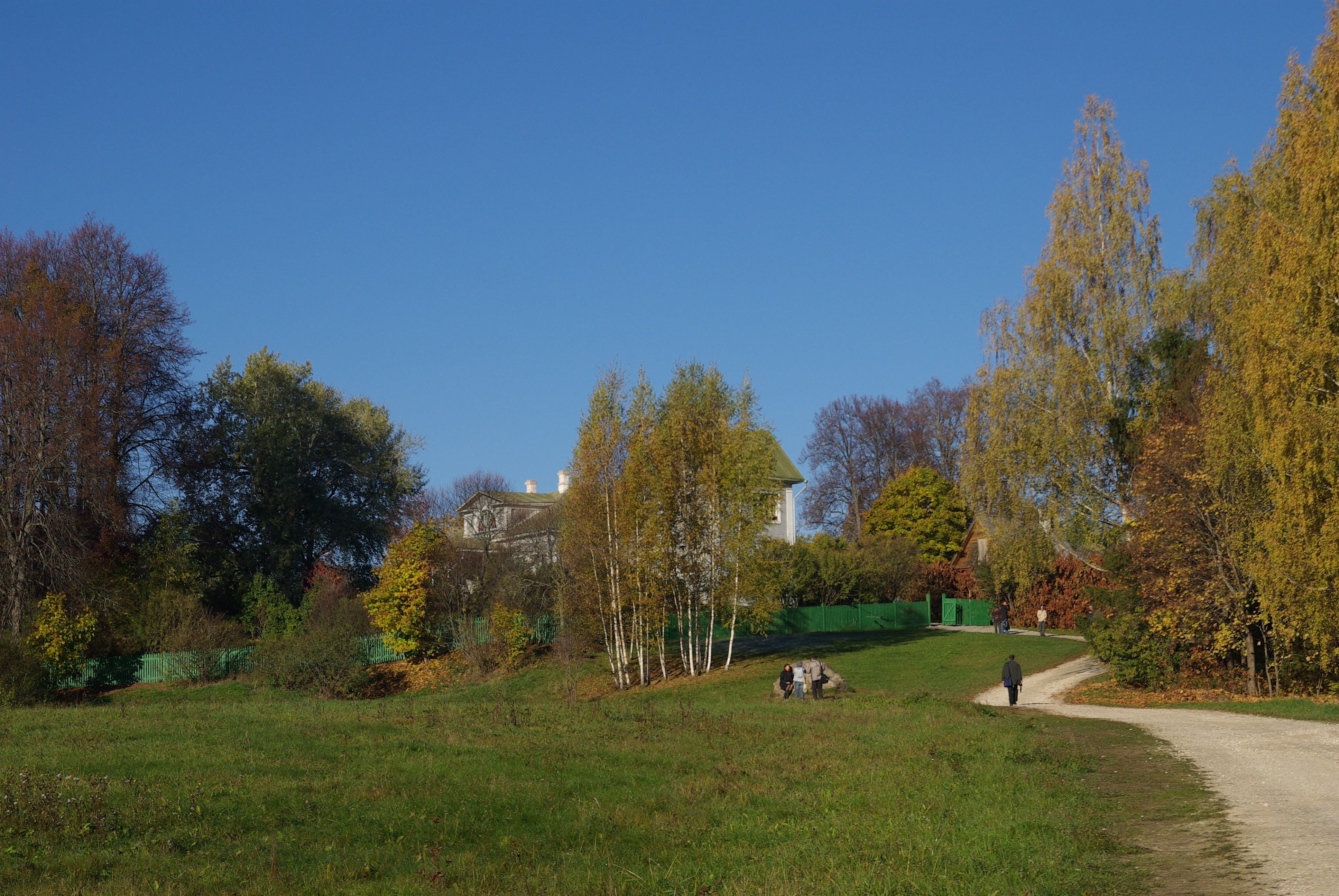 Усадьба А.А. Блока "Шахматово"